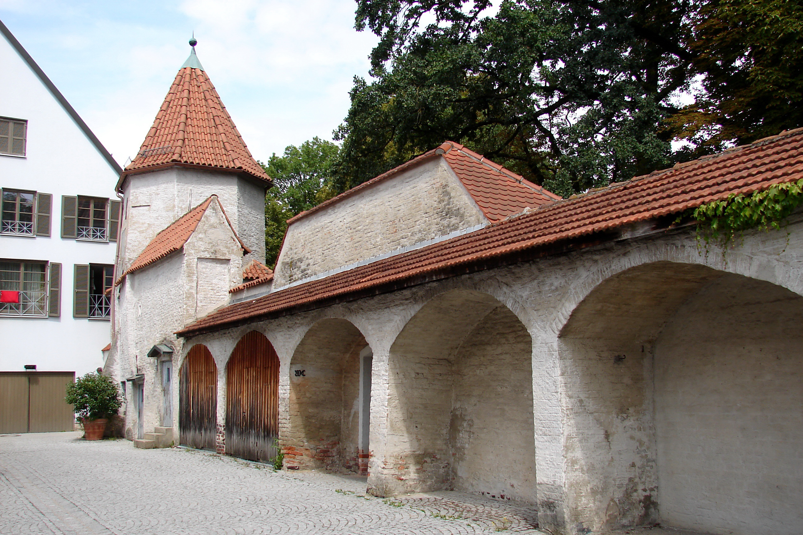 Turm mit Achteckaufsatz an der Stadtmauer, erste Hälfte 15. Jahrhundert; Gartenhäuschen auf der Stadtmauer, Mitte 19. Jahrhundert.